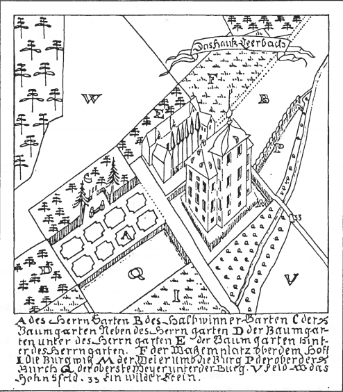 Wasserschloss Lerbach